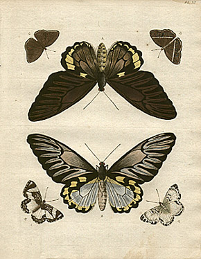 Plate from Papillons Exotiques des Trois parties du Monde: l'Asie, l'Afrique et l'Amerique Amsterdam, 1779-91